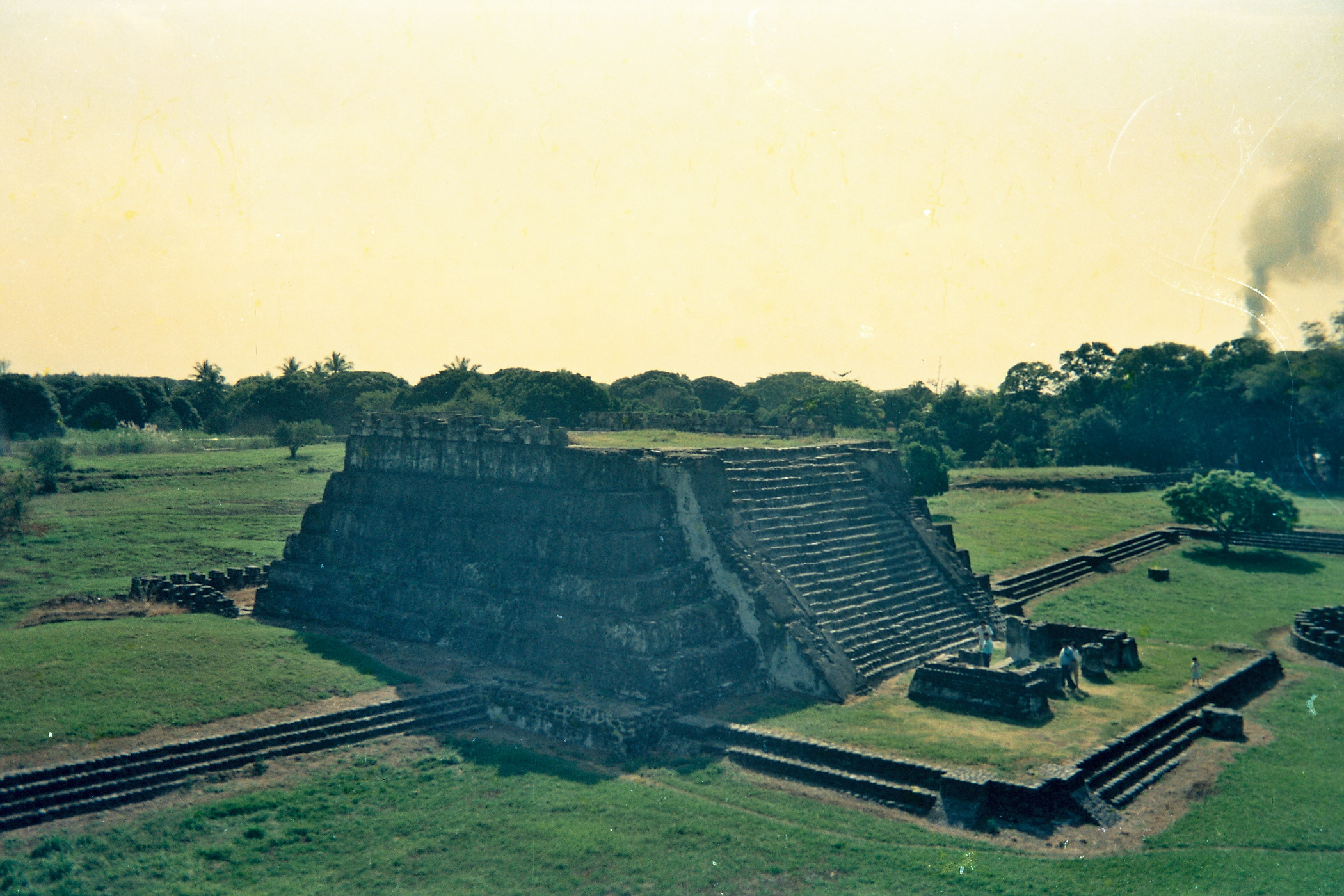 Photo taken in Cempoala, State of Veracruz, Mexico. IMPROVED: This is a digitalize picture from and old picture. Picture should be improved when posible. NOTE: Photo nead to be describe. SPANISH: Foto tomada en Cempoala, Estado de Veracruz, México. MEJORA: Esta imagen se ha digitalizado a partir de un negativo viejo, la foto debe ser mejorada cuando sea posible. SPANISH: Foto tomada en de Oaxaca, México.